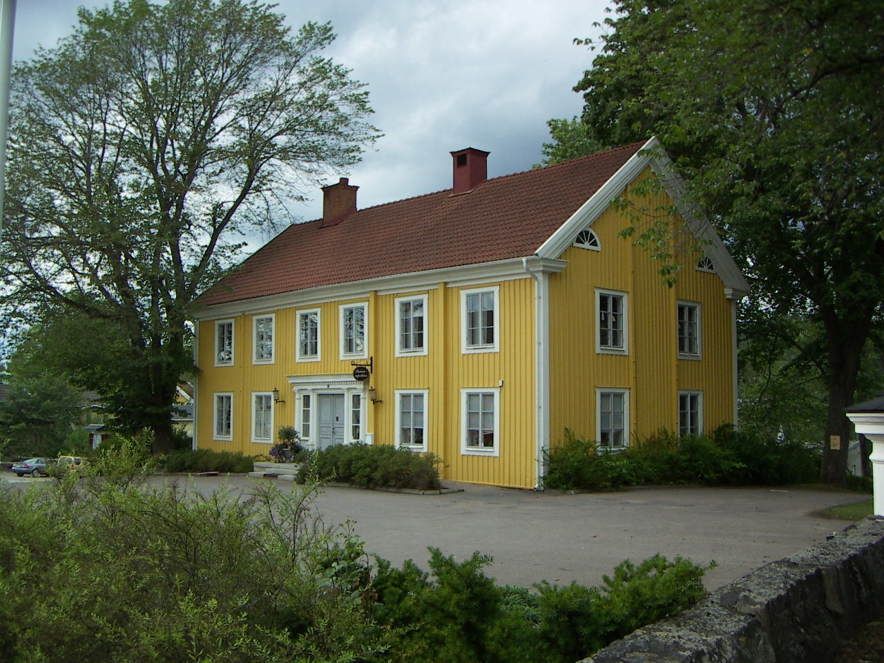 Virserums Sockenstuga, innehåller pastorsexpeditionen.